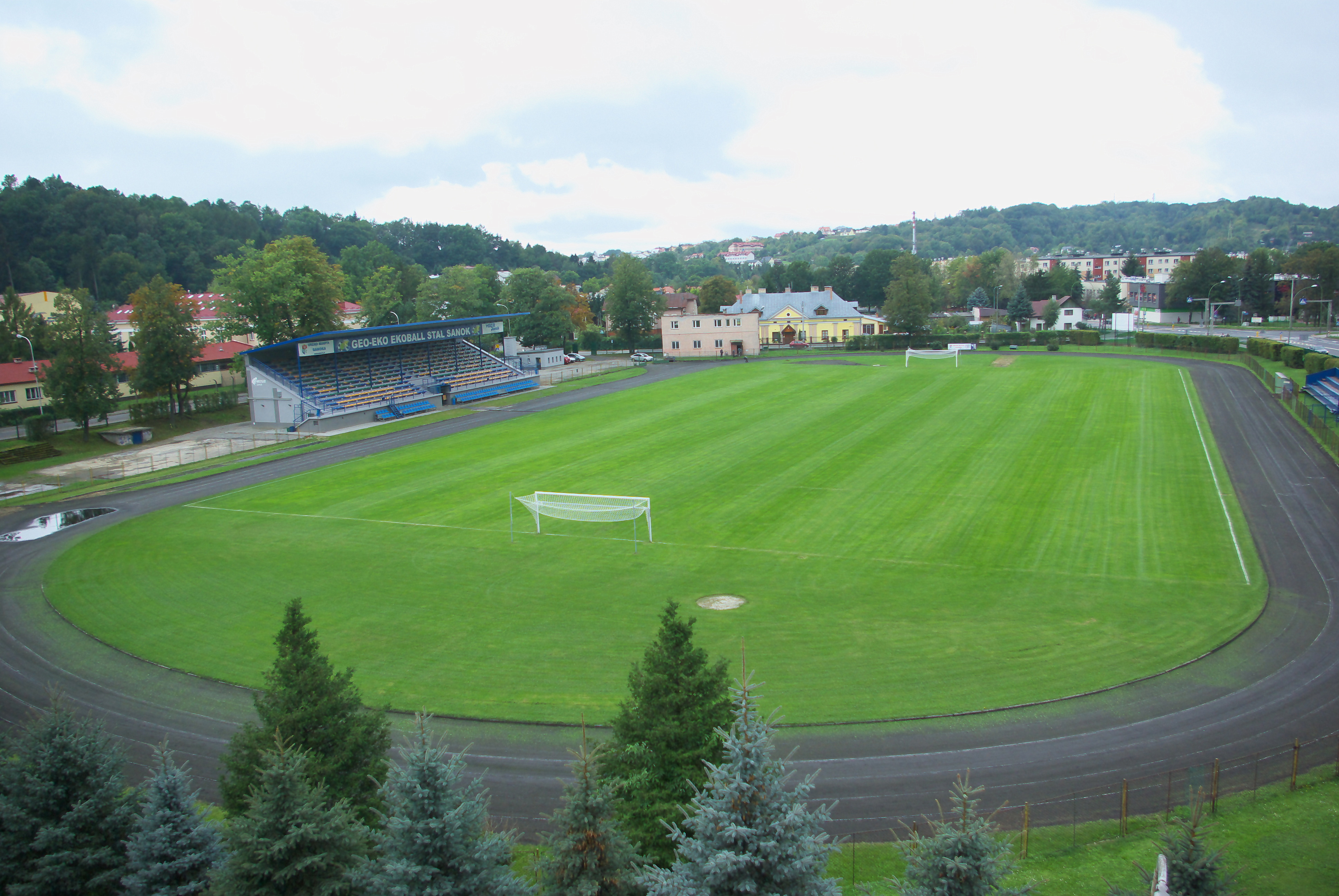 Stadion Wierchy w Sanok (po remoncie w 2017).